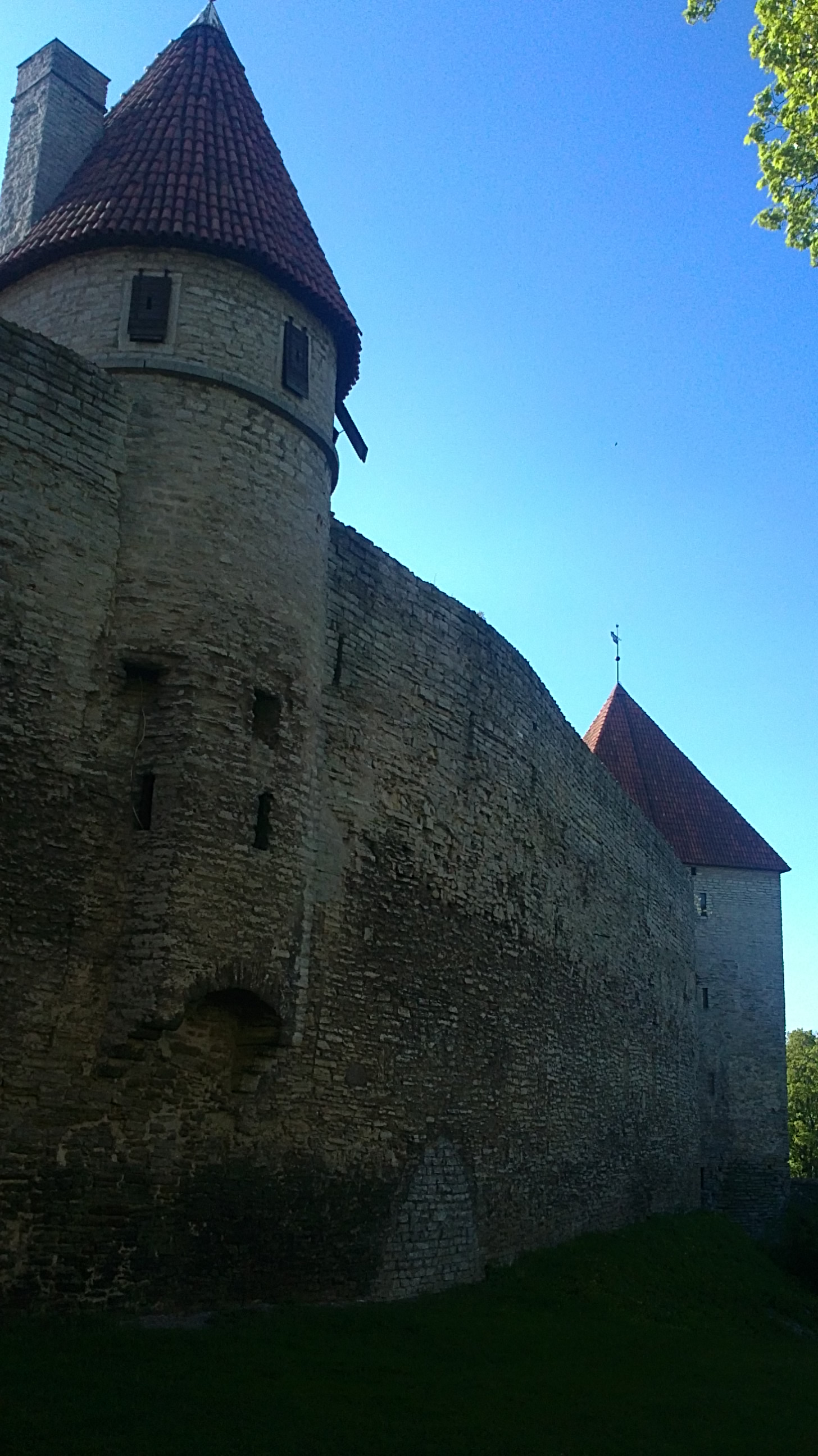 Tallinna linnamüüri Tallitorn ja Neitsitorn, vaade Toompealt